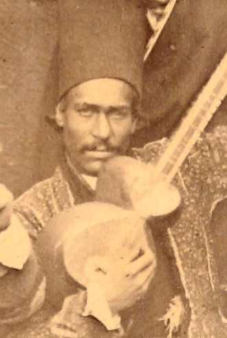 .عکس توسط آقارضاعکاسباشی در سال 1280 قمری انداخته شده است اصل عکس در آلبوم خانه کاخ گلستان و منتشر شده در کتاب موسیقی ایران در سده گذشته (انتشارات فرهنگستان هنر)